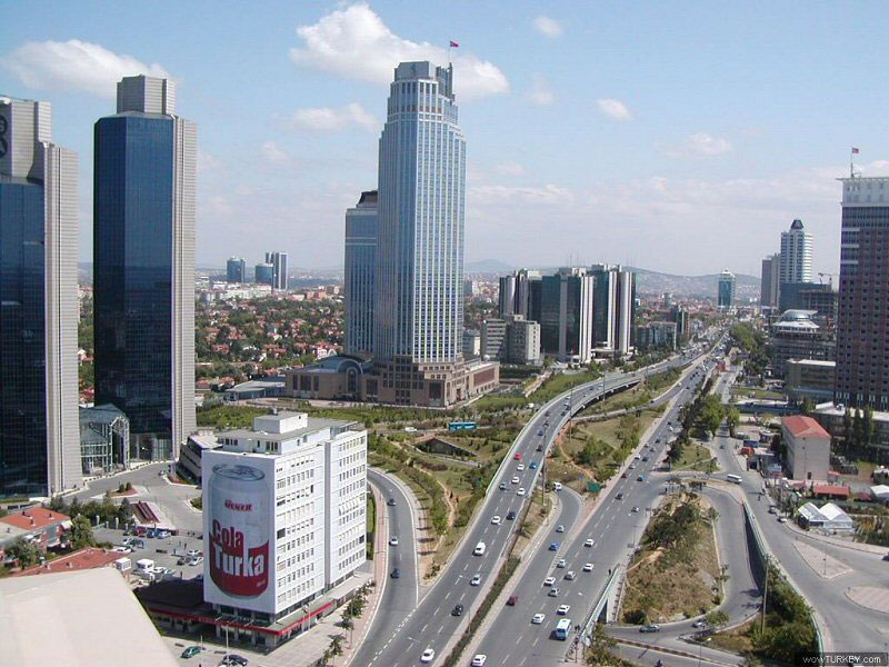 Geschäfts- und Bankenviertel von Istanbul.